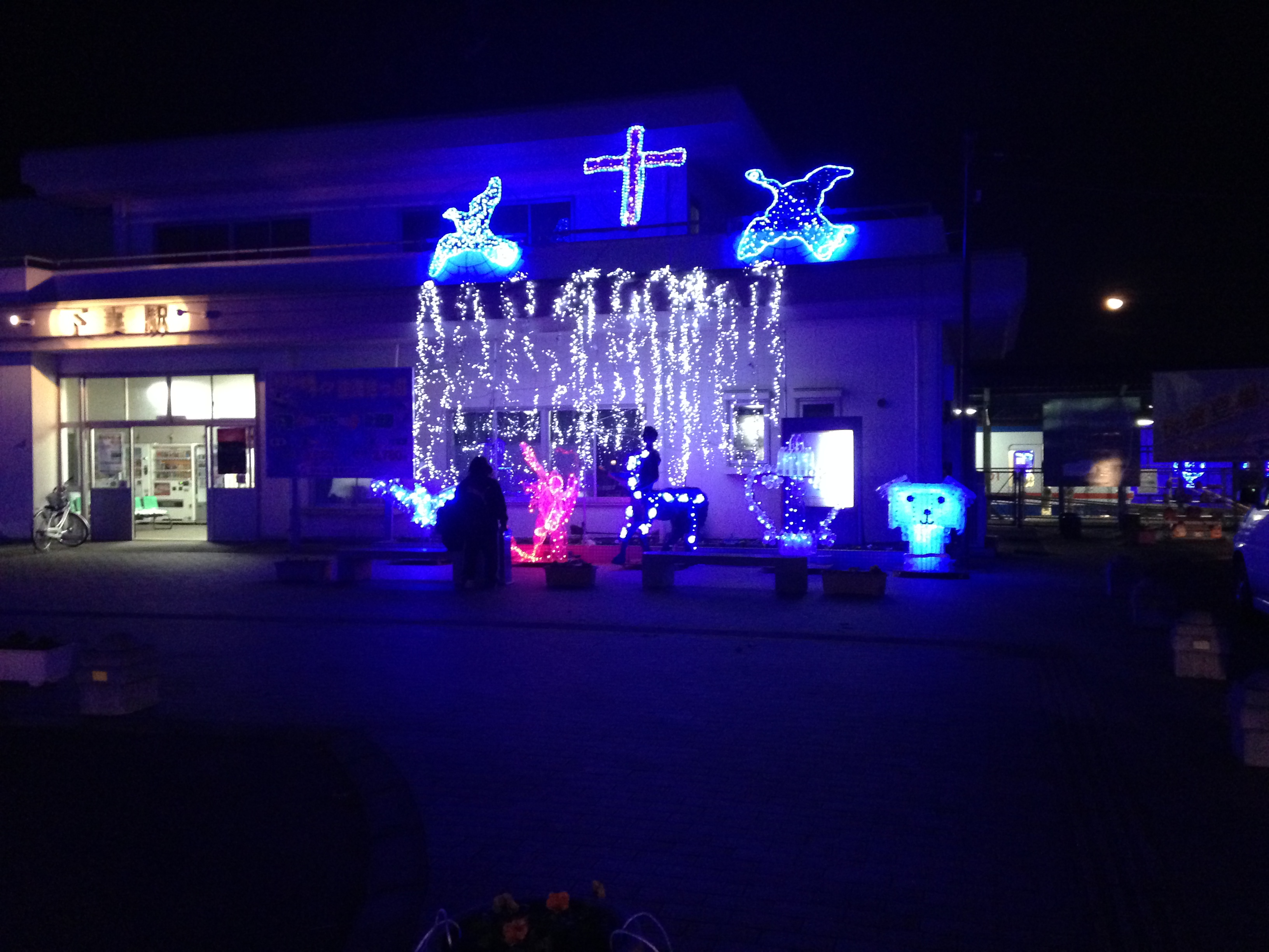 「下妻”冬”物語~第二章~イルミネーションナイト」(2013) 駅舎付近のイルミネーション。